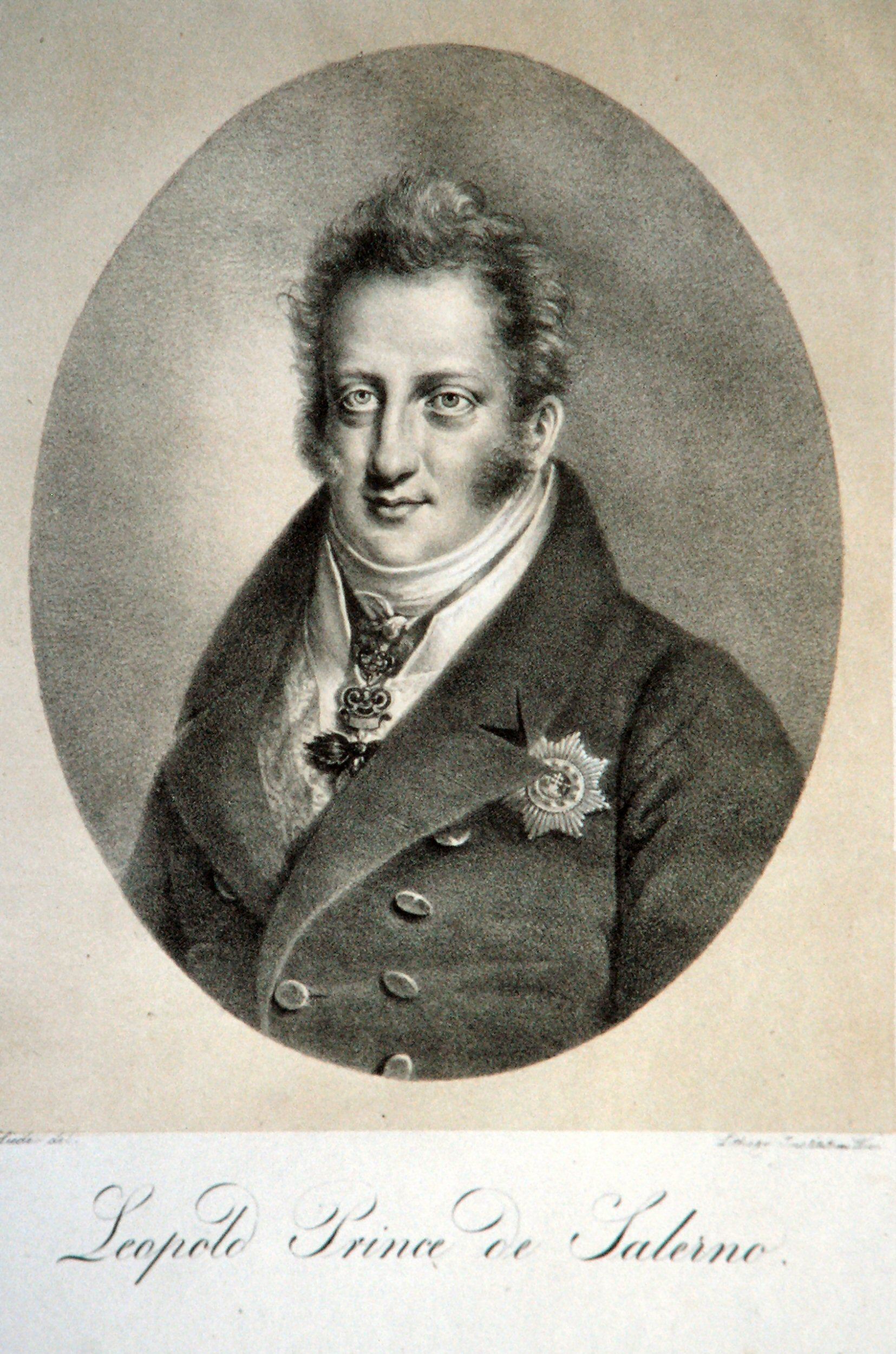 Leopold von Neapel-Sizilien (1790-1831) Prinz von Salerno. Lithographie von Friedrich Lieder, ca. 1830